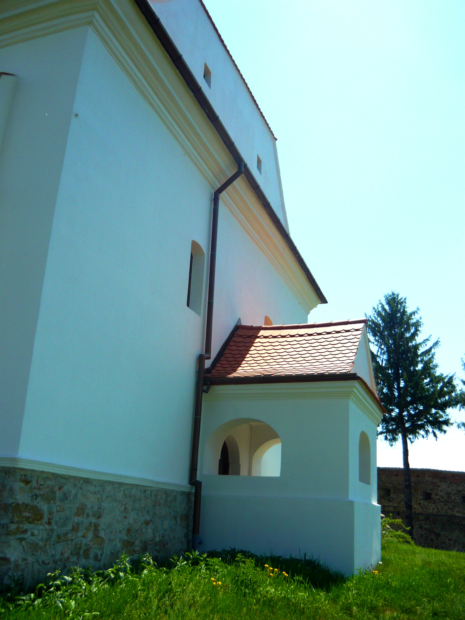 Biserica reformată. Biserica Reformată din Ilieni. Jud. Covasna, perete Sudic. 01